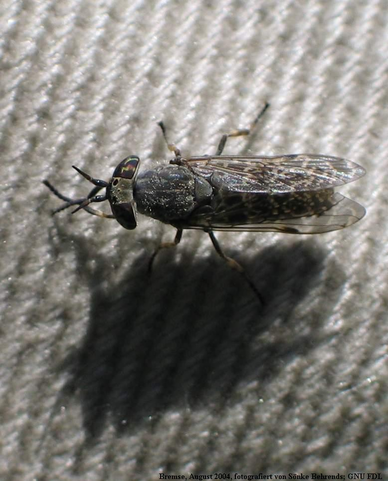 Bremse